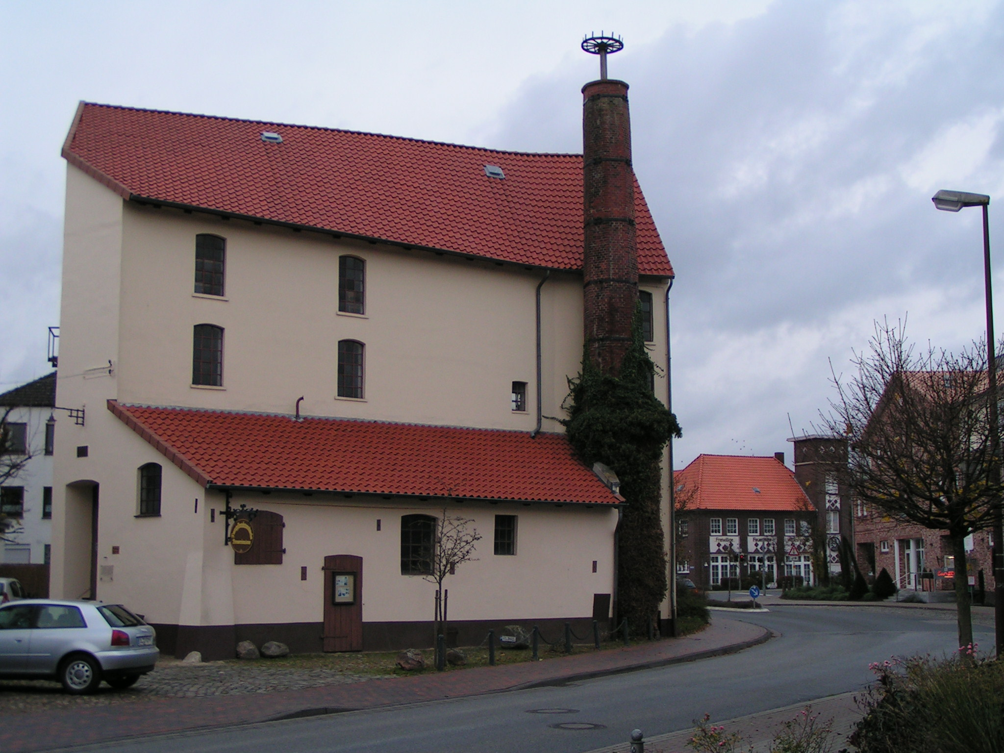 Brennereimuseum (vorne links) und Feuerwehr (hinten rechts) in Wildeshausen